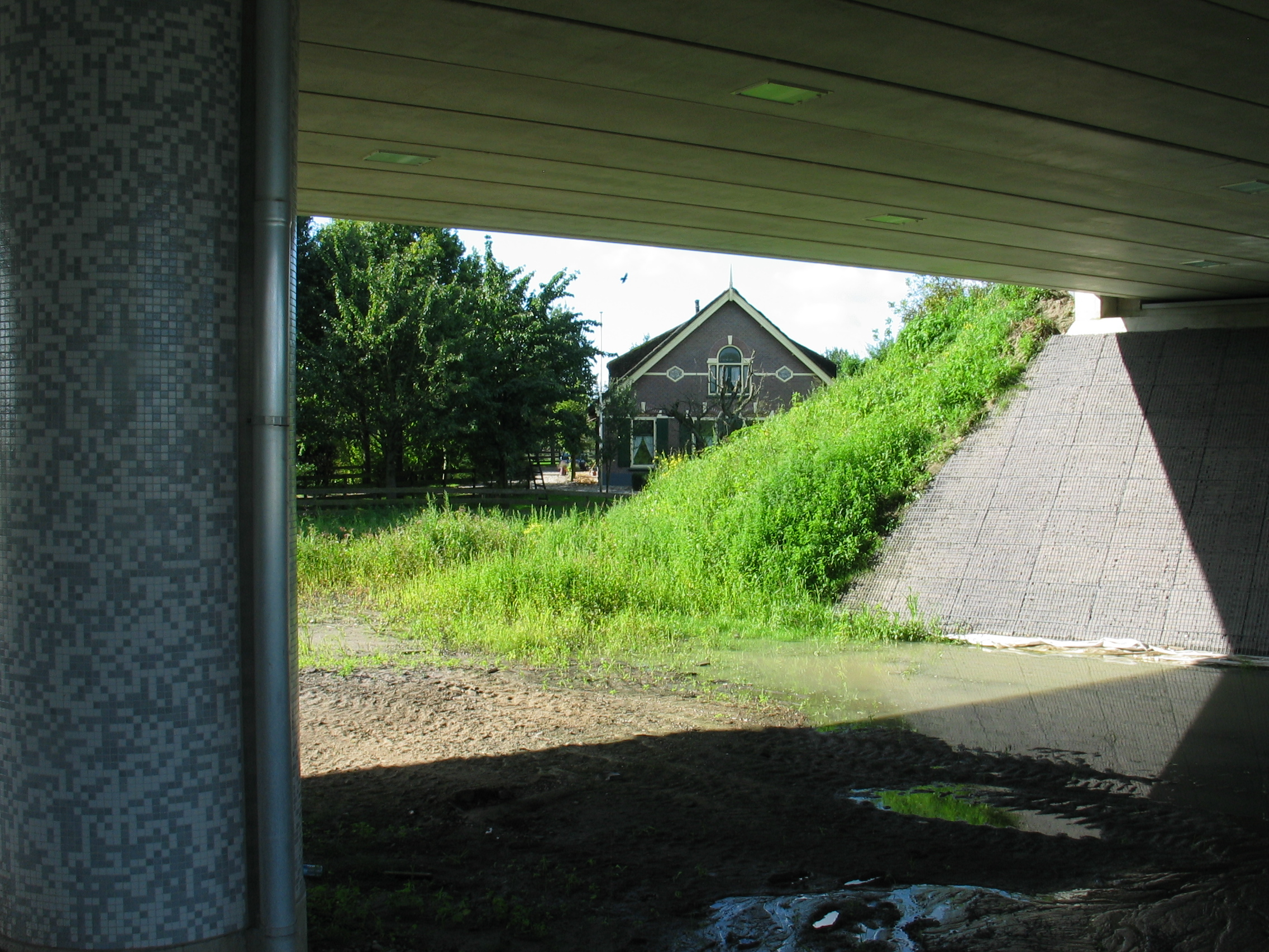 Waar je tot voor kort over de weilanden uitkeek over het terrein van het voormalige Huis te Vleuten, belemmeren nu de pijlers van het spoorviaduct tussen Woerden en Utrecht het zicht.